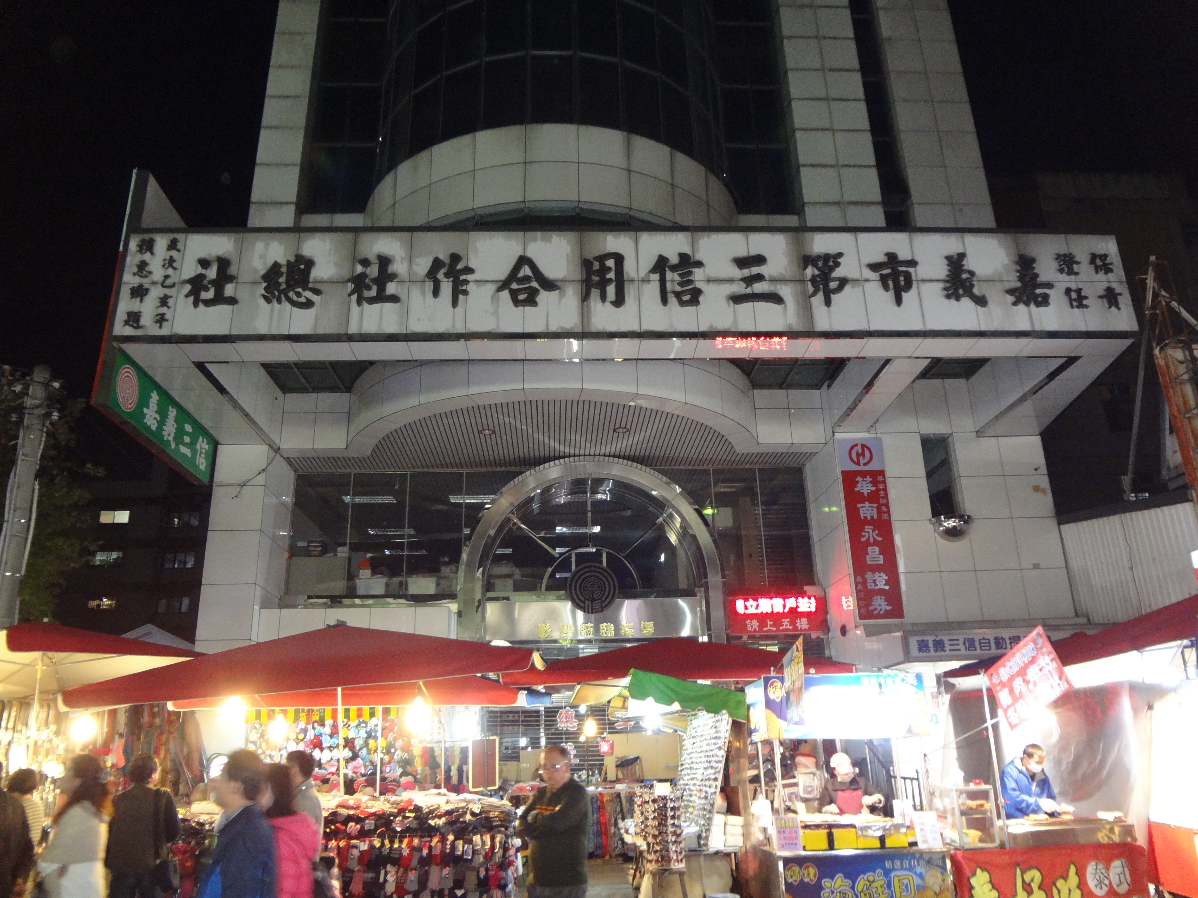 嘉義市第三信用合作社總社，位於嘉義市西區文化路85號。拍攝時下方為文化路夜市。